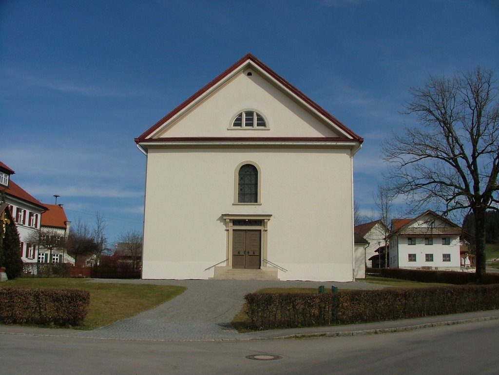 Wuchzenhofen Pfarrkirche im klassischen Stil